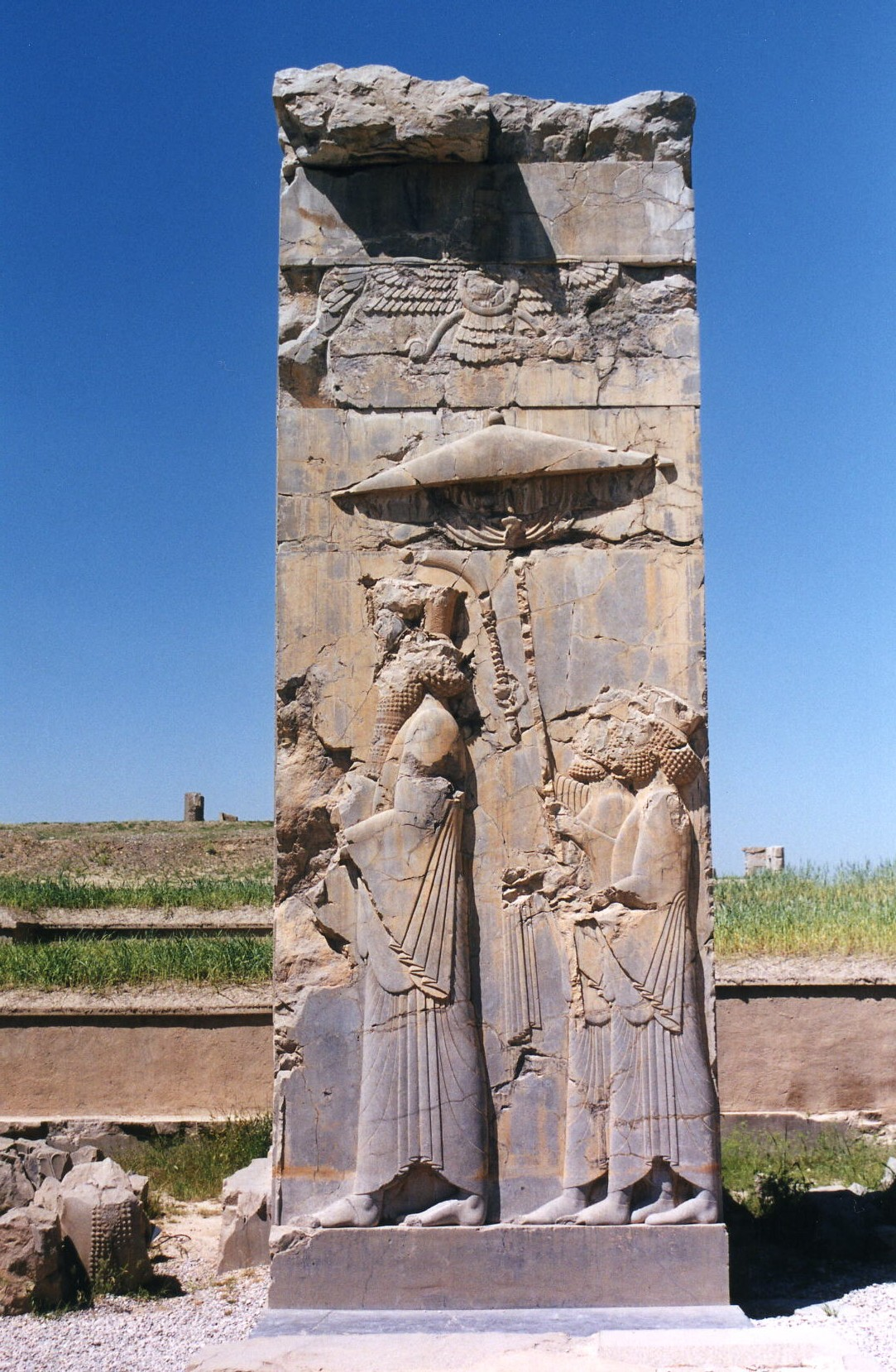 Persépolis (Iran). Le roi Darius Ier sous un parasol. VIe-Ve s. av. J.-C. Photo Ginolerhino 2002. This picture shows King Xerxes (darius I's son) and not Darius. The relief is part of the Hadish, Xerxes Palace in Persepolis/Cette image montre le roi Xerxès (fils de Darius I) et non Darius. Il s'agit d'un relief du Hadish, palais de Xerxès à Persepolis. Pentocelo 15:51, 11 November 2006 (UTC)